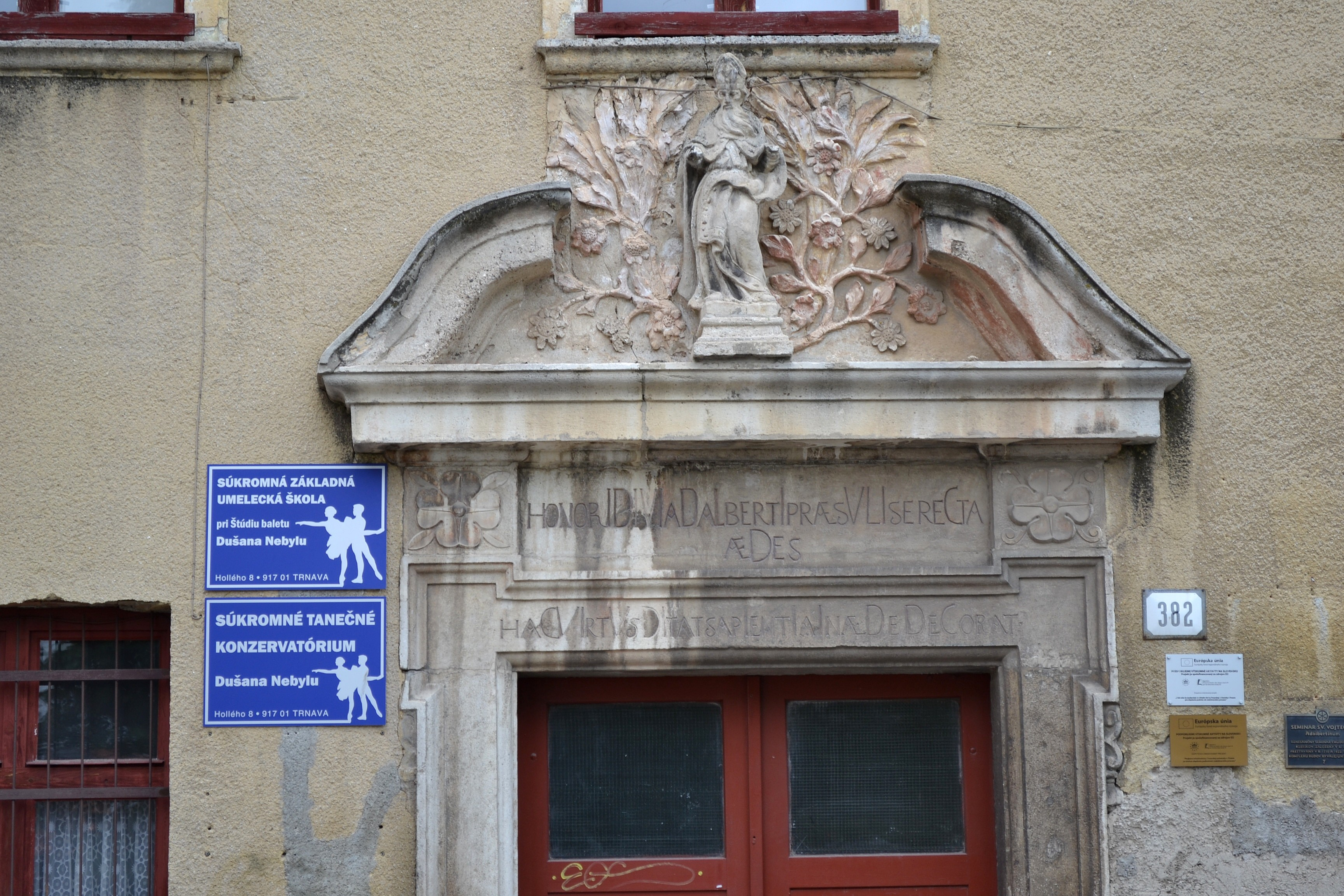 Trnava, komplex univerzitných budov; budova Seminára svätého Vojtecha (Adalbertinum), detail vrchnej časti portálu so sochou patróna a chronostikonom